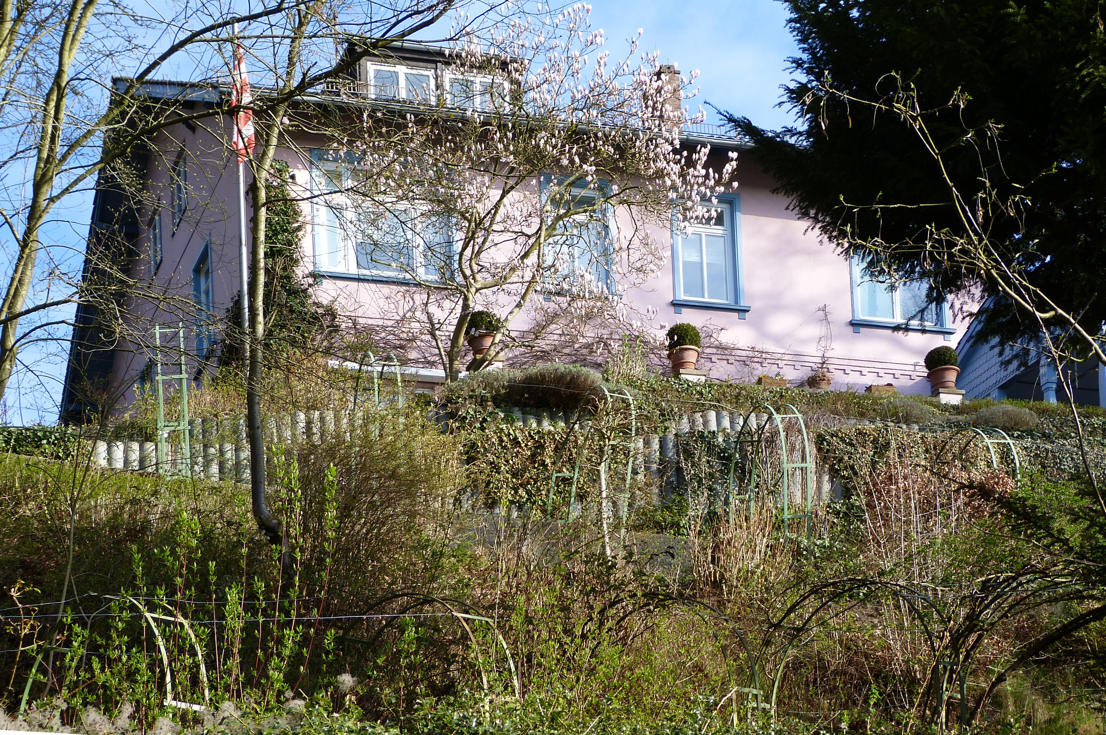 Haus Lichtenegg in Bremen, Lesmonastraße 66. (Die merkwürdige Perspektive ist Folge des Höhenunterschieds von ca. 15 m zwischen Kamerastandpunkt und Haus aufgrund der schroff abfallenden Geestkante.)Das abgebildete Objekt ist ein geschütztes Kulturdenkmal in der Freien Hansestadt Bremen, mit der Nr. 1295 beim Landesamt für Denkmalpflege registriert.